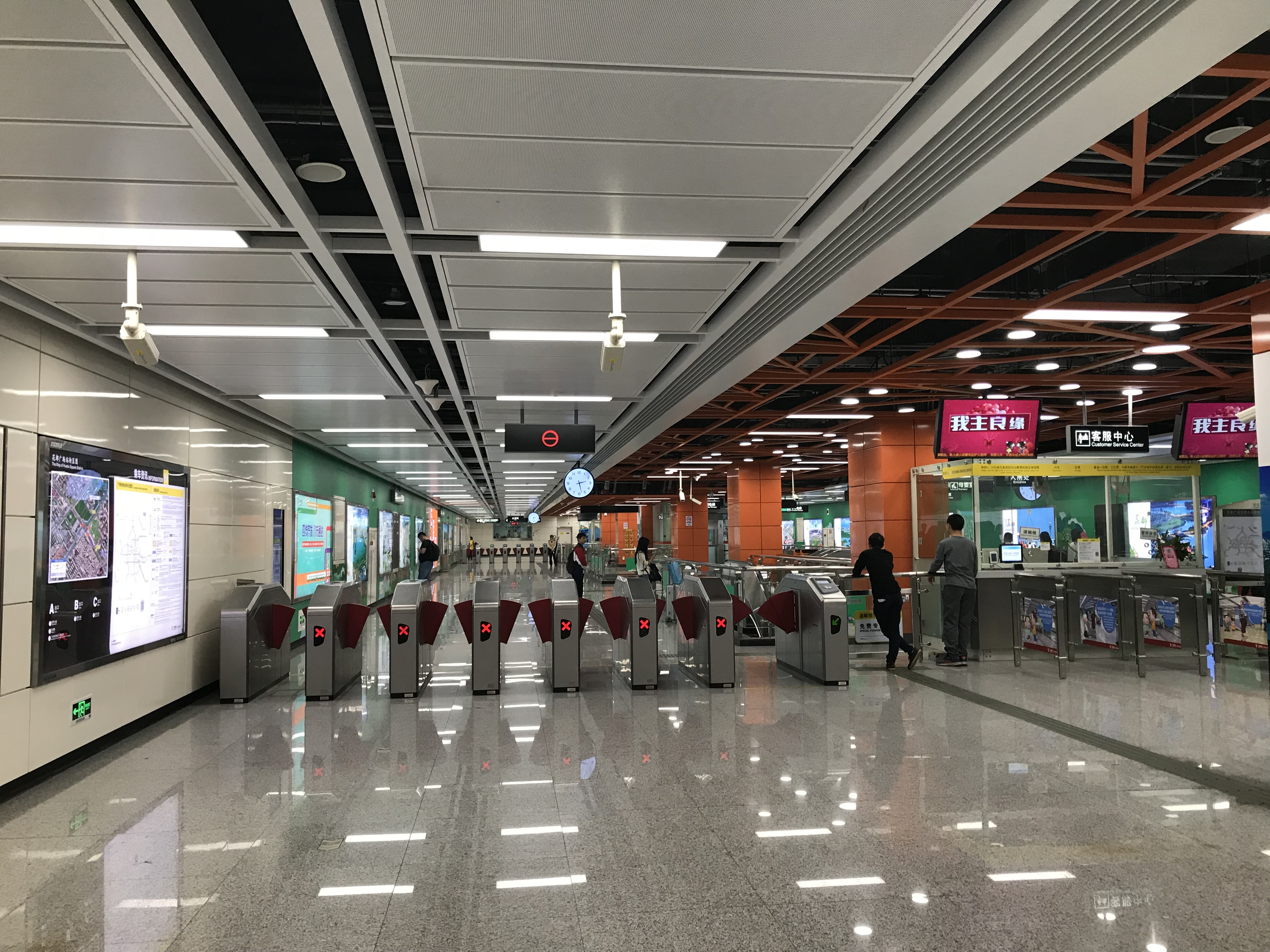 广州地铁花都广场站